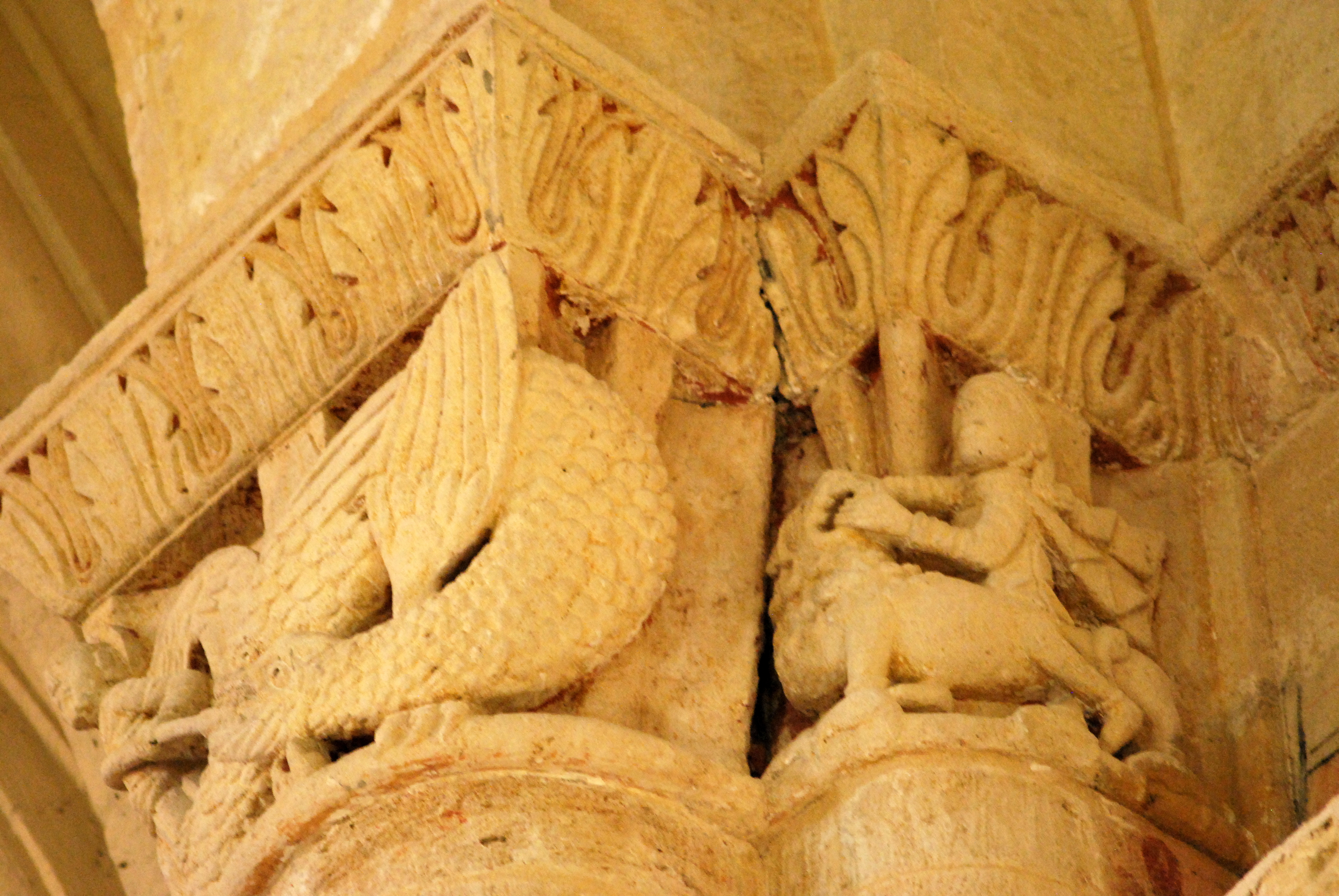 Église Saint-Quentin de Baron (Gironde)